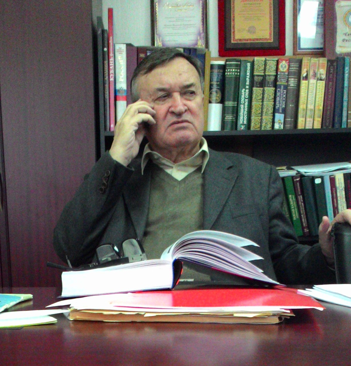 Музаев, Магомед Нурдиевич